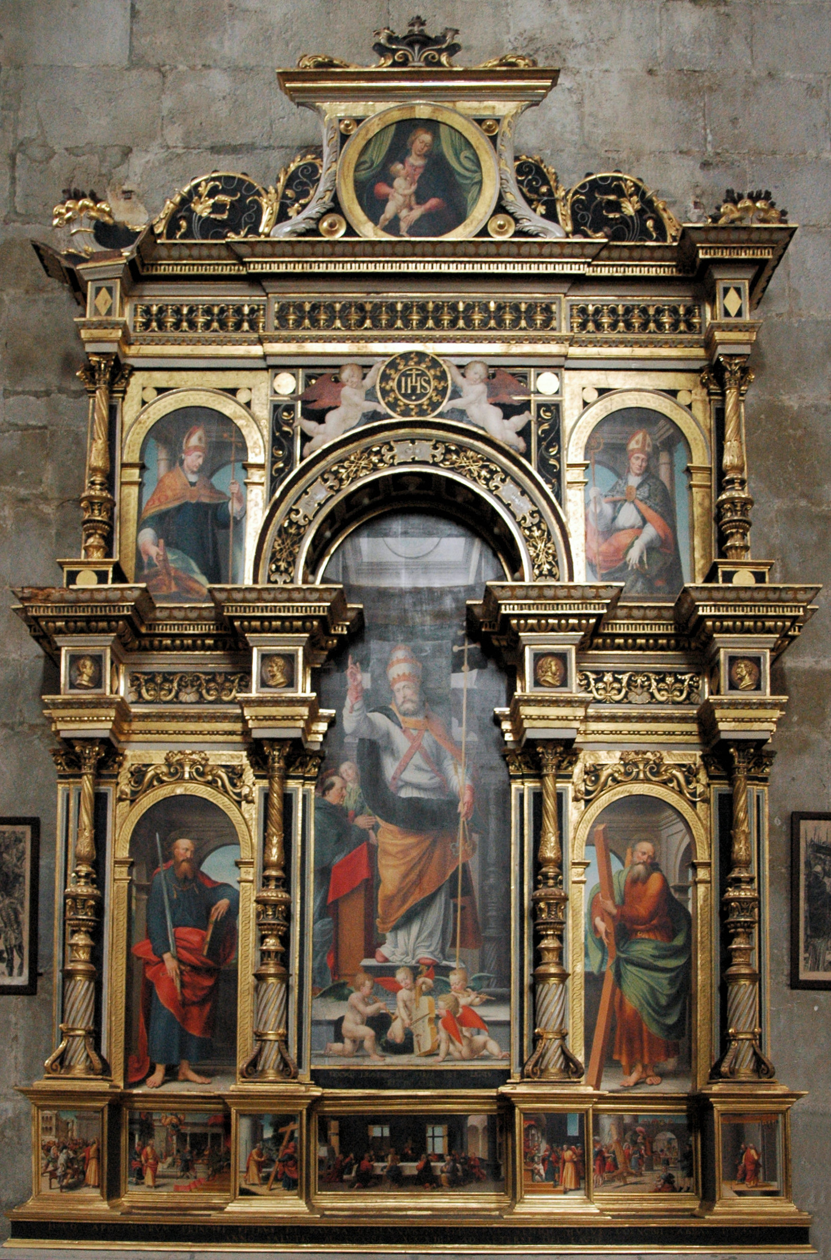 Autel d'Olbein - Cathédrale de Saint-Claude